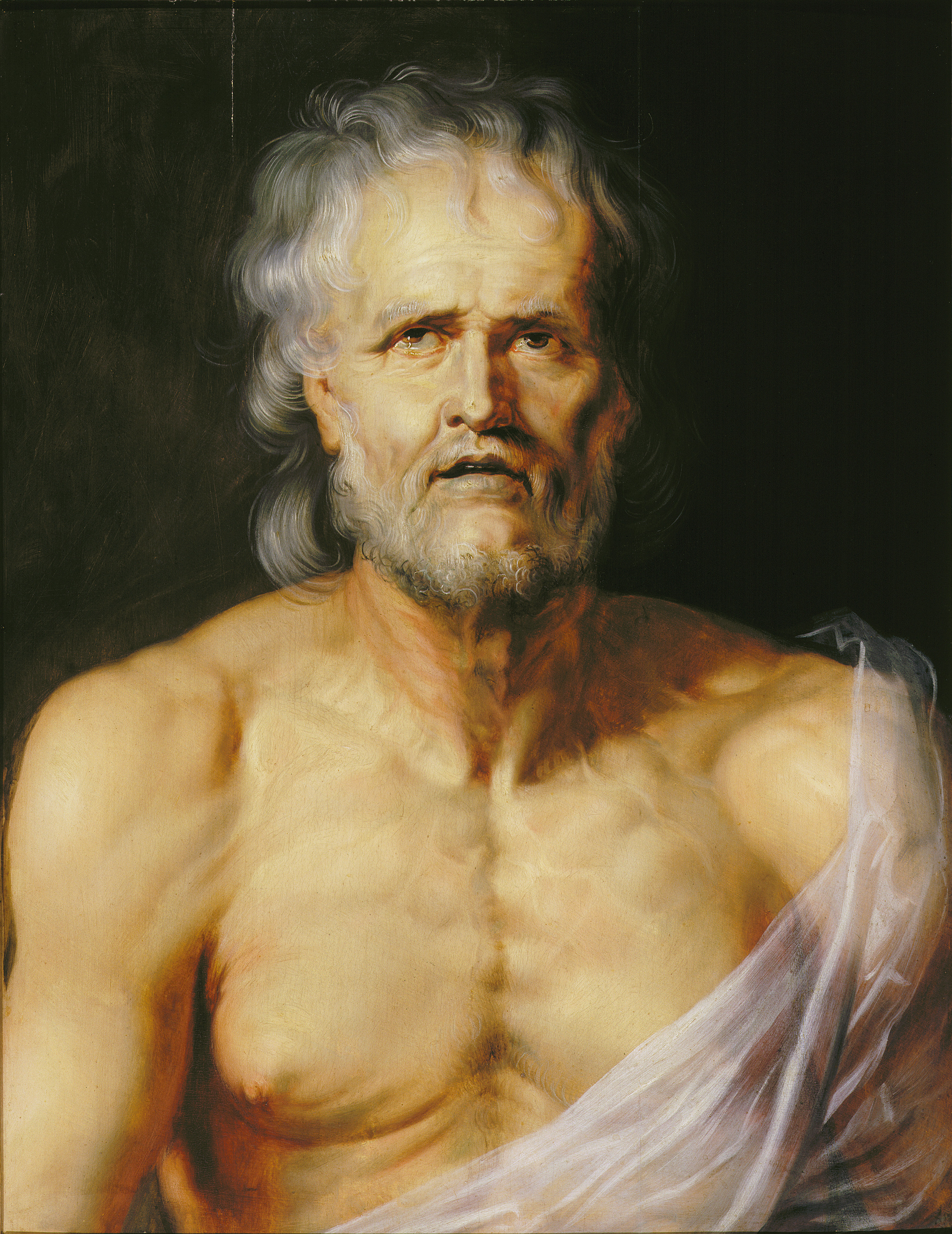 schilderij ( Peter Paul Rubens ( Museum Plantin-Moretus